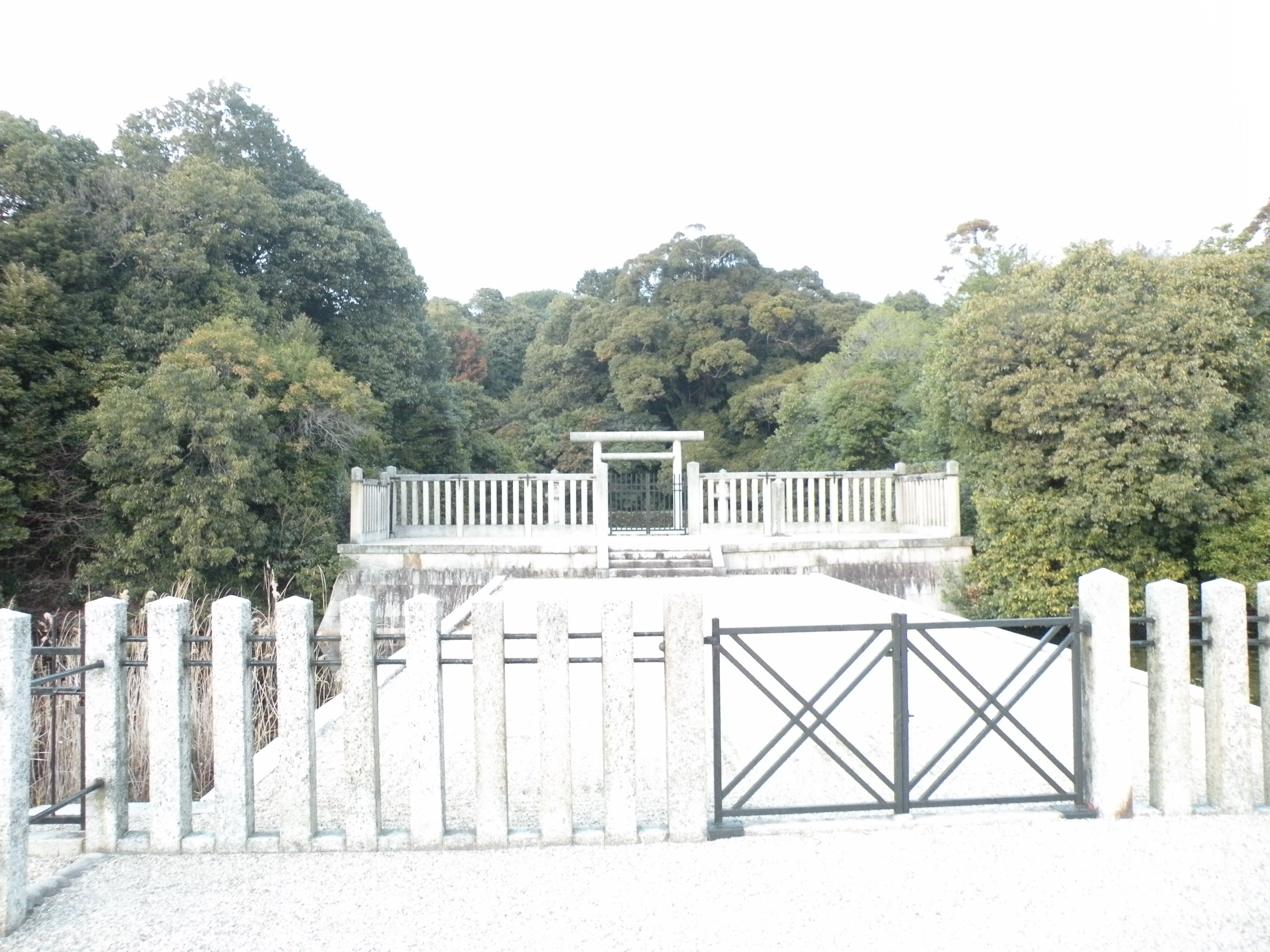 ヒシアゲ古墳の拝所。